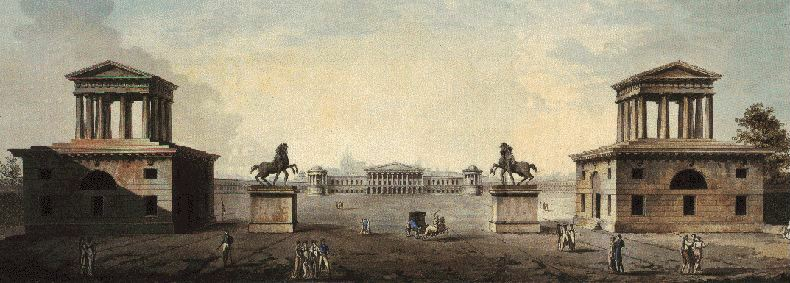 Veduta del Foro Buonaparte e del Castello (lato Milano), secondo il progetto dell'Antolini